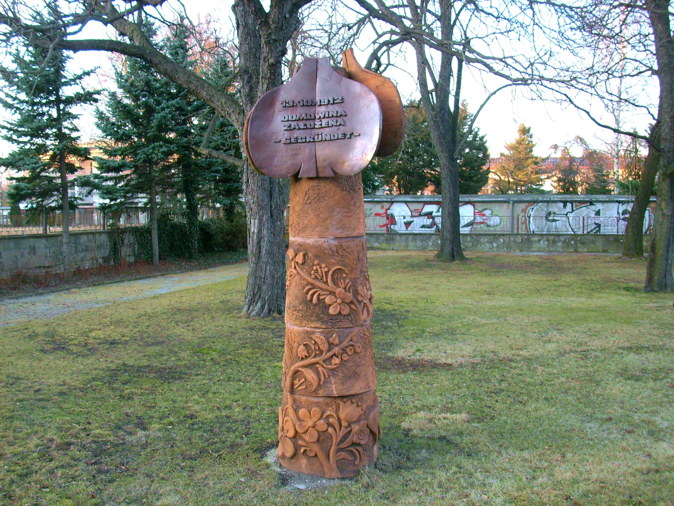 Keramikplastik (1987) von Jěwa Wórša Lanzyna im Gedenken an die Gründung der Domowina (1912) im Gesellschaftshaus, Braugasse 1 in Hoyerswerda